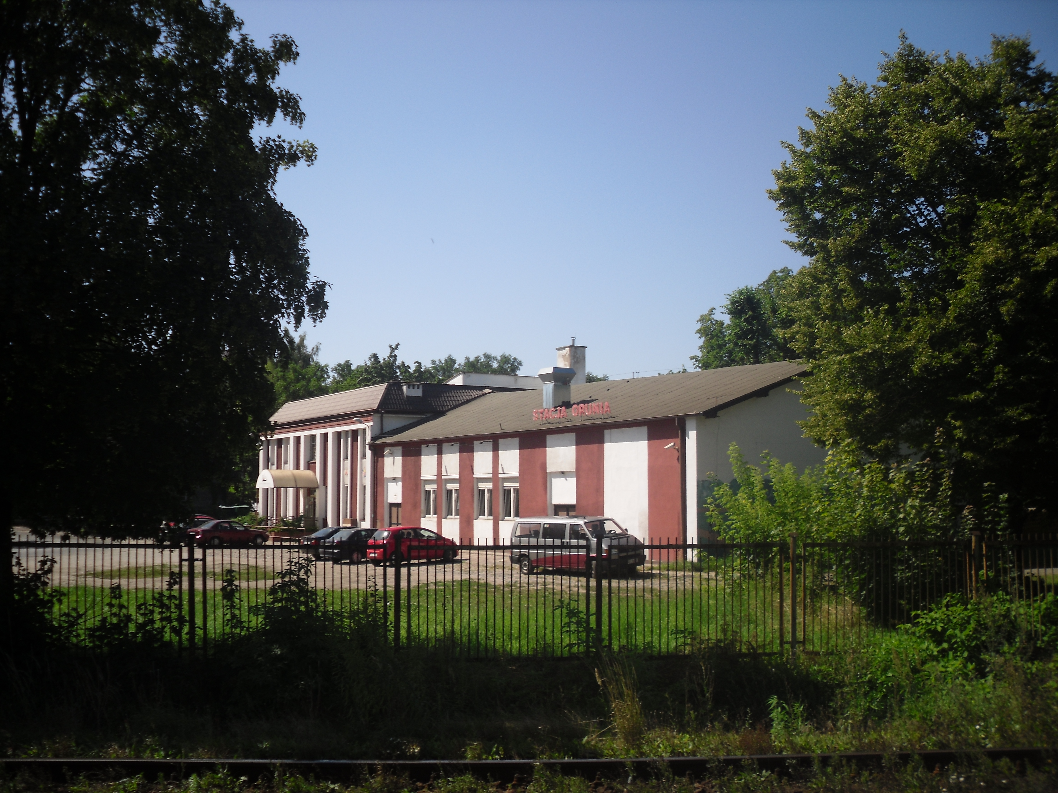 Galeria ("Dworek Artura") obok stacji.